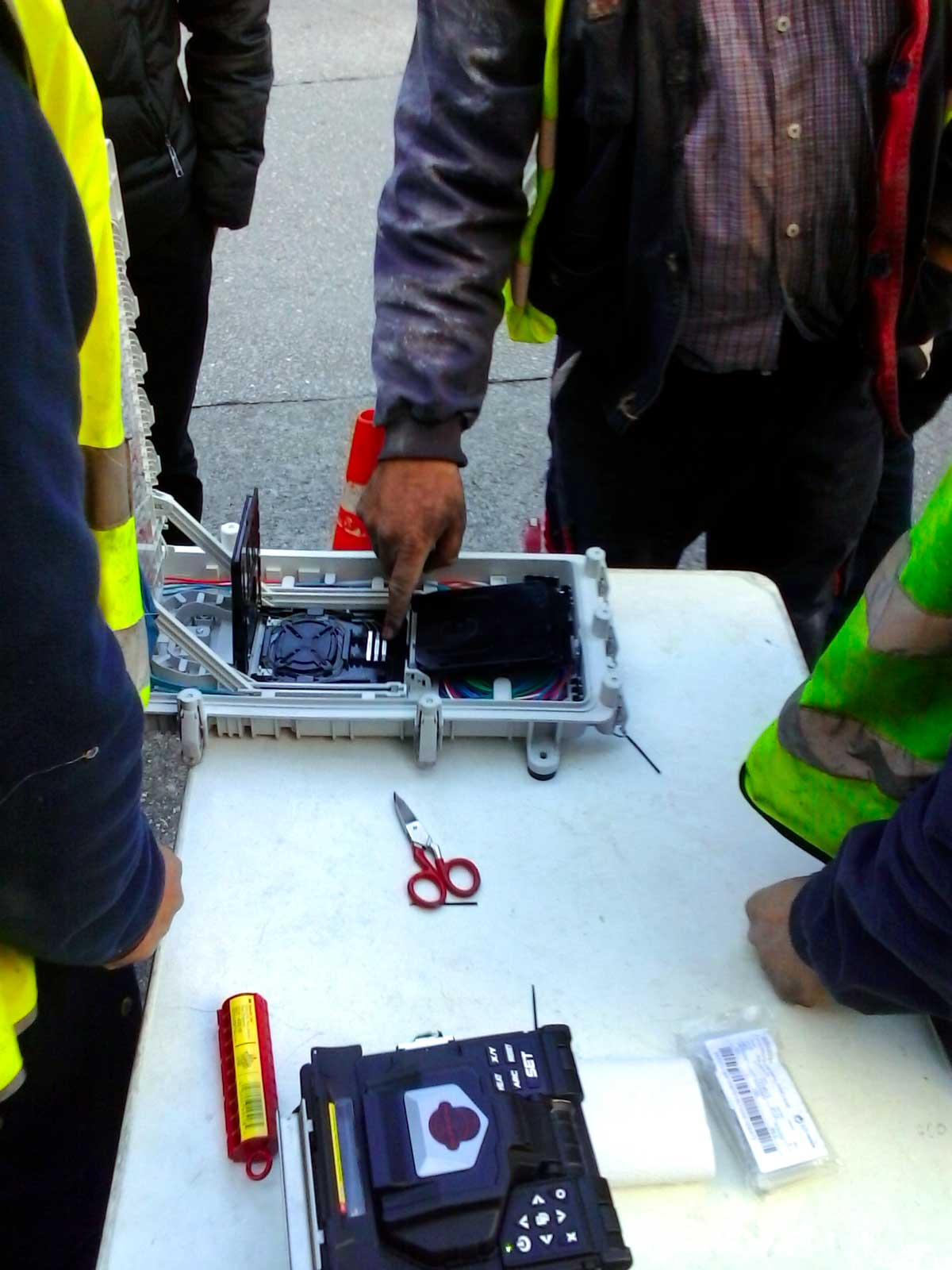 Técnico sinalando os (tres) divisores ópticos 1:4 dunha caixa de empalmes FTTH, en primeiro termo unha fusionadora de fibra óptica.